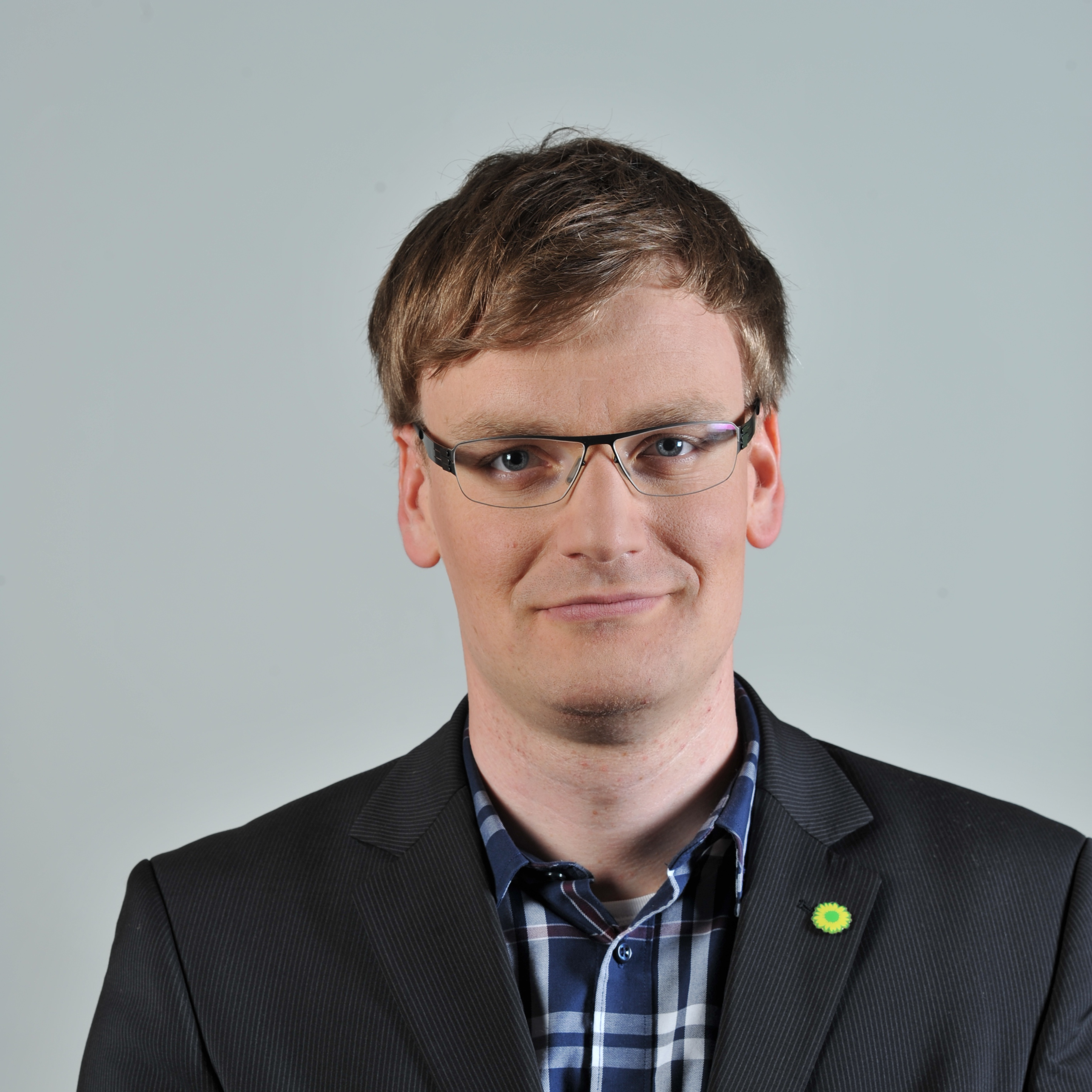 Landtagsprojekt Mecklenburg-Vorpommern 2013: Johannes Saalfeld, Bündnis 90 / Die Grünen